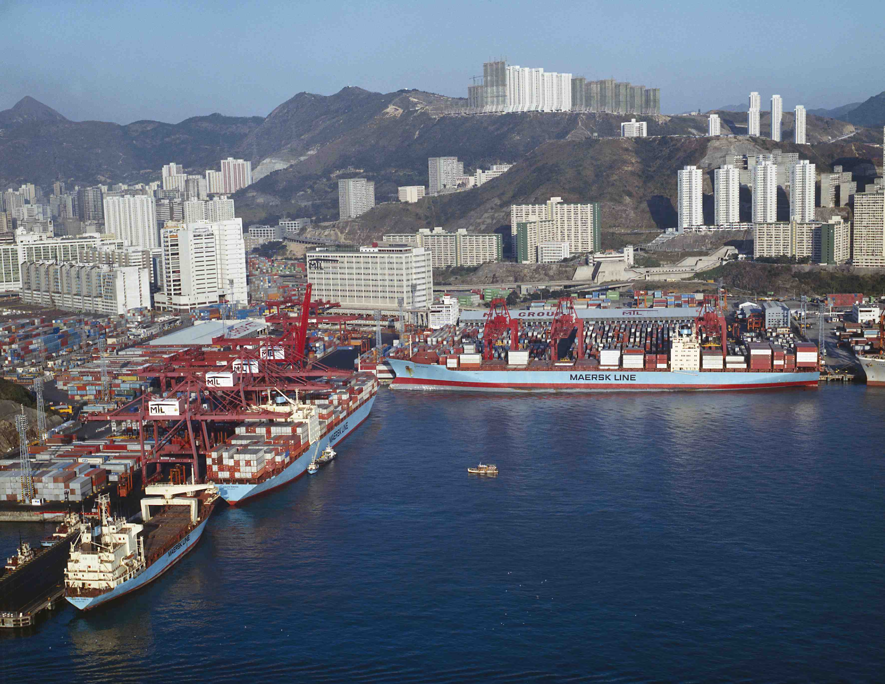 Louis (1984), Leda (1982) and Tempo (1984)